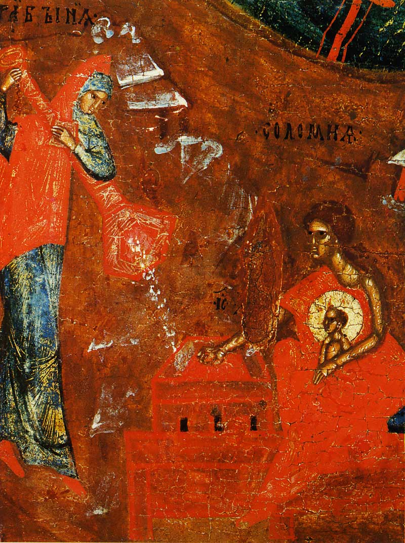 Купание младенца Христа (Деталь иконы «Рождество Христово с избранными святыми». Псков, к. XV века)